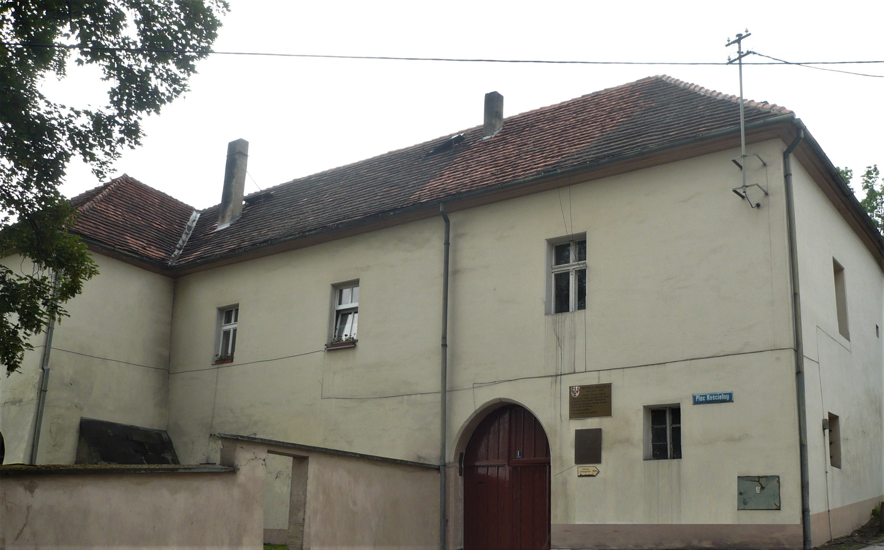 Złoty Stok